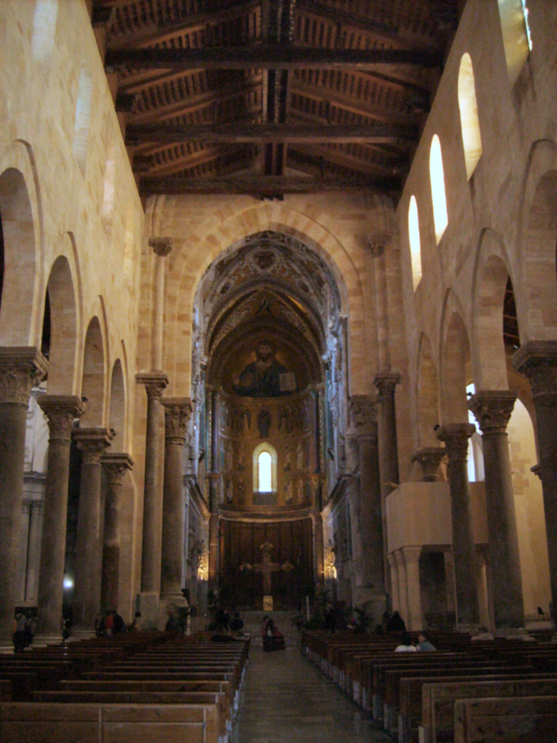 interno della cattedrale di Cefalù con capriate e abside. Il "cielo stellato" come pure gran parte delle travi del soffitto furono dipinte con scenette di genere e fregi animalistici e mitologici da maestranze islamiche prevalentemente di cultura fatimita, affini a quelle attive nella decorazione del soffitto ligneo della Cappella Palatina di Palermo.